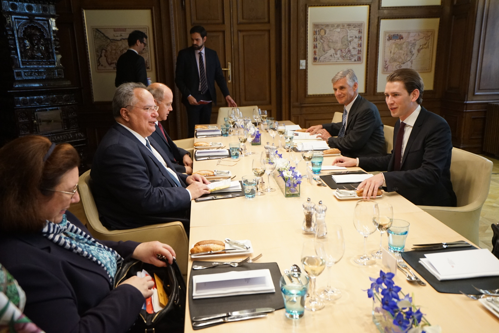 Ο Υπουργός Εξωτερικών, κ. Νίκος Κοτζιάς κατά τη διάρκεια του γεύματος εργασίας που παράθεσε ο Υπουργός Εξωτερικών της Αυστρίας κ. Sebastian Kurz, Βιέννη 11.5.2016